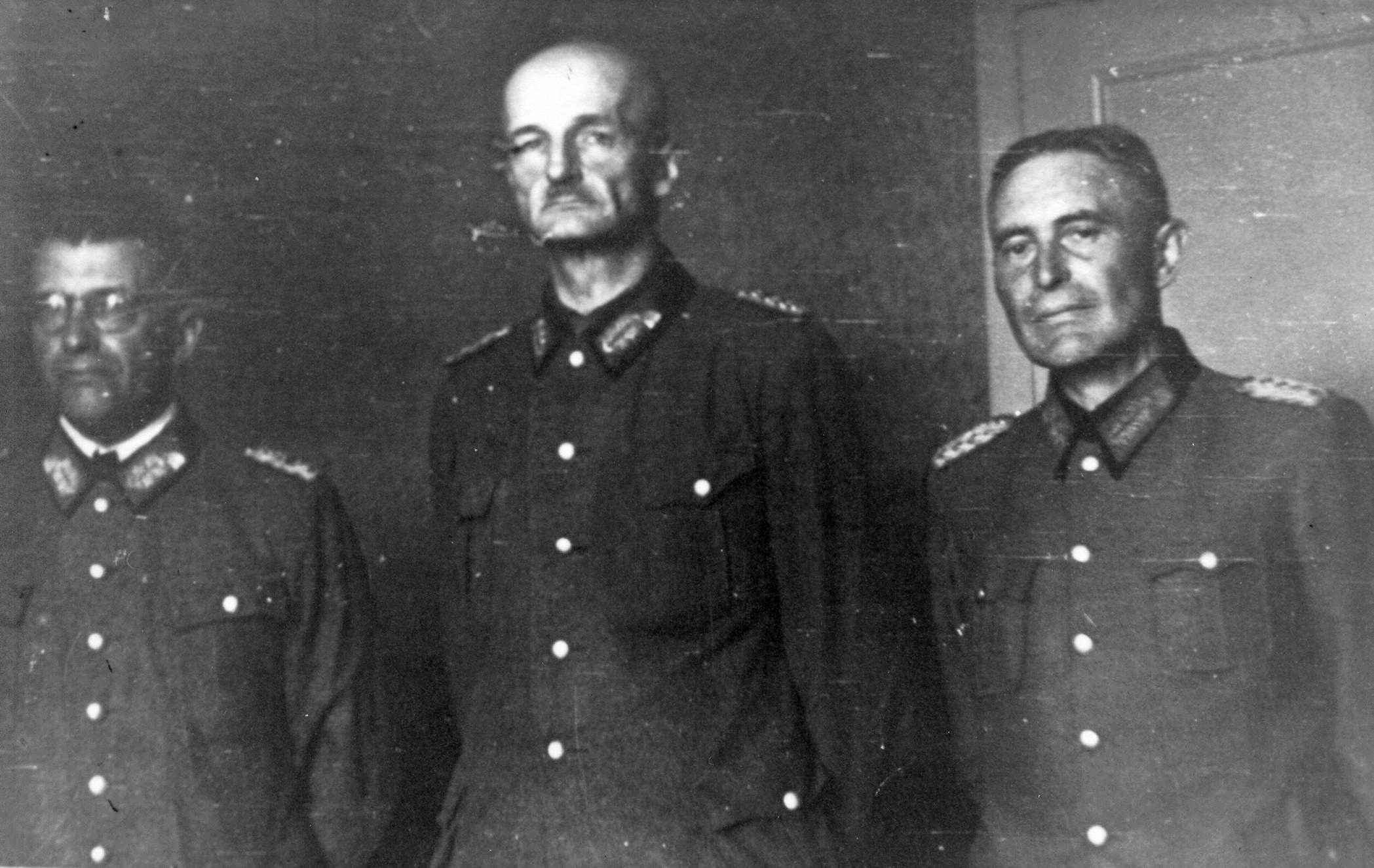 Nemački generali zarobljeni u Sloveniji, maja 1945. godine.